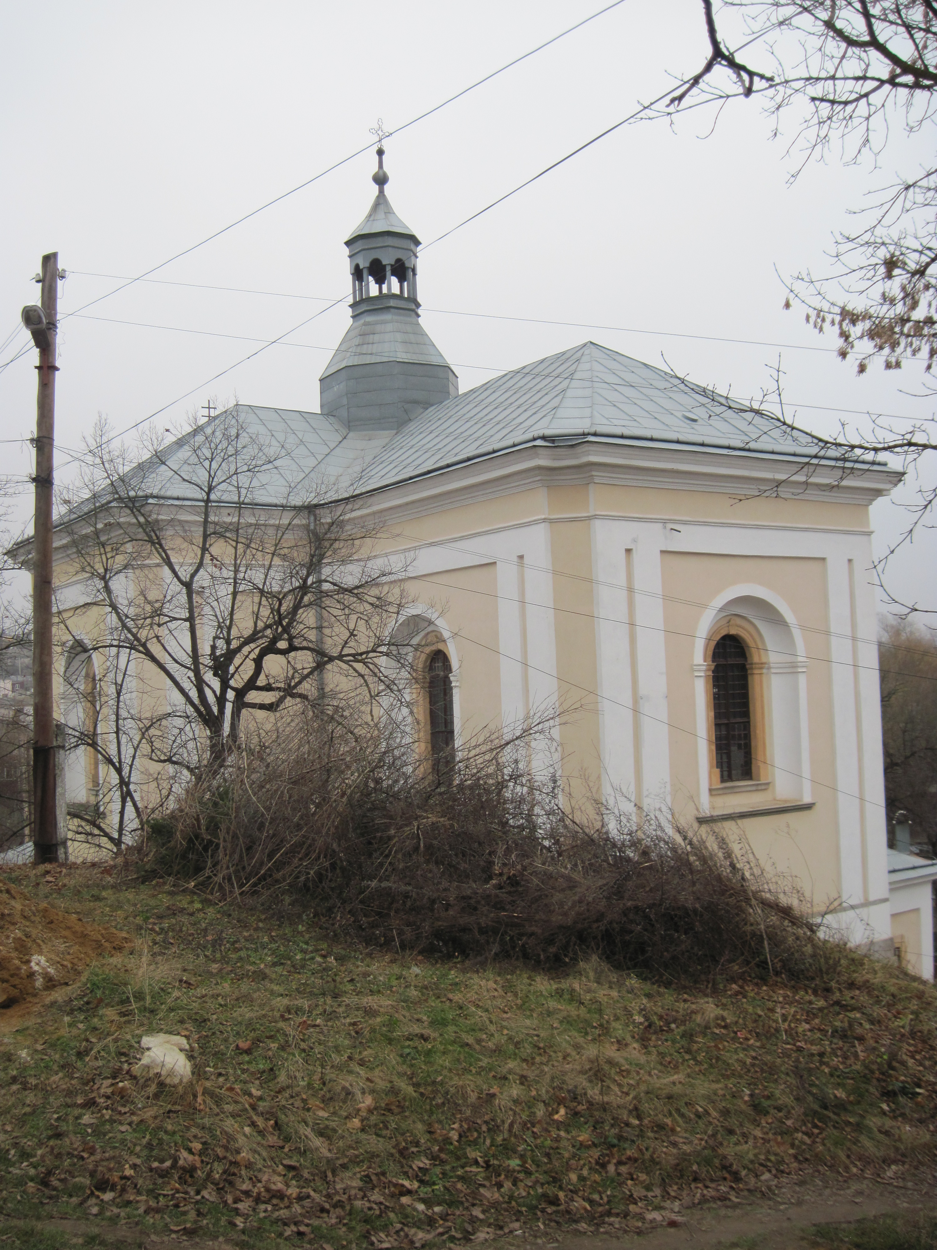 Купи гілля на порожньому замість дзвіниці костелу Внебовзяття Пресвятої Діви Марії, Бучач 2014